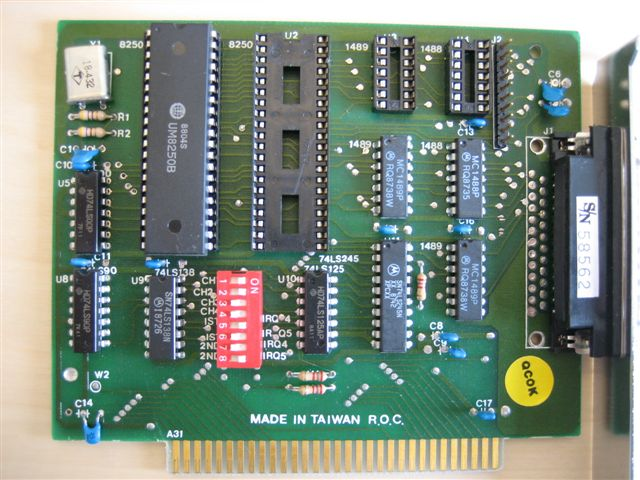 Serial Card